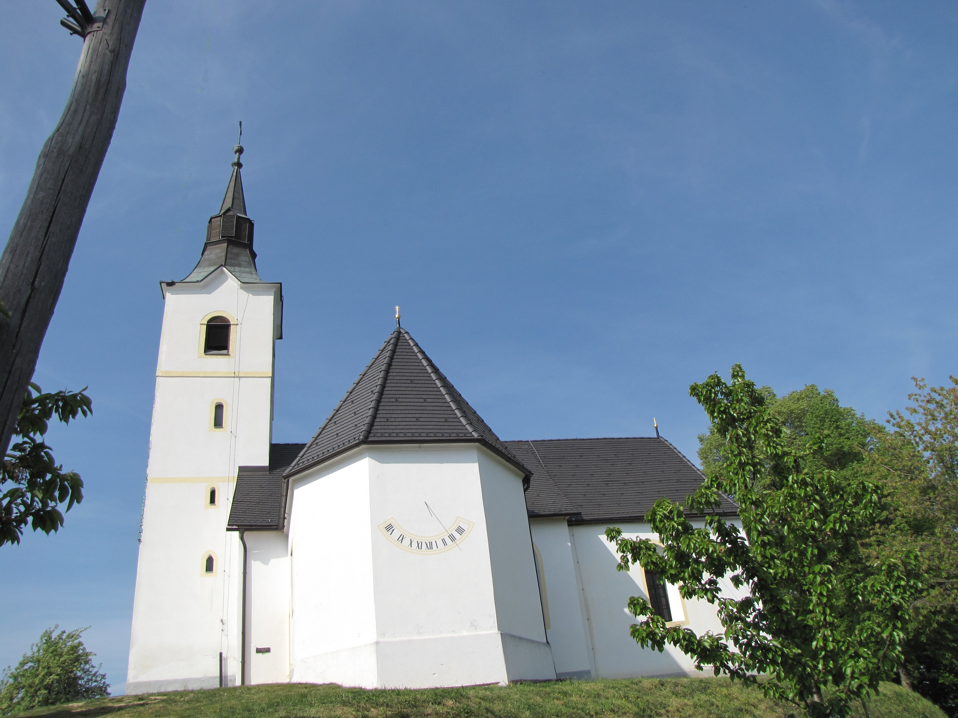 Sv Kanigunda (Šentjungert)